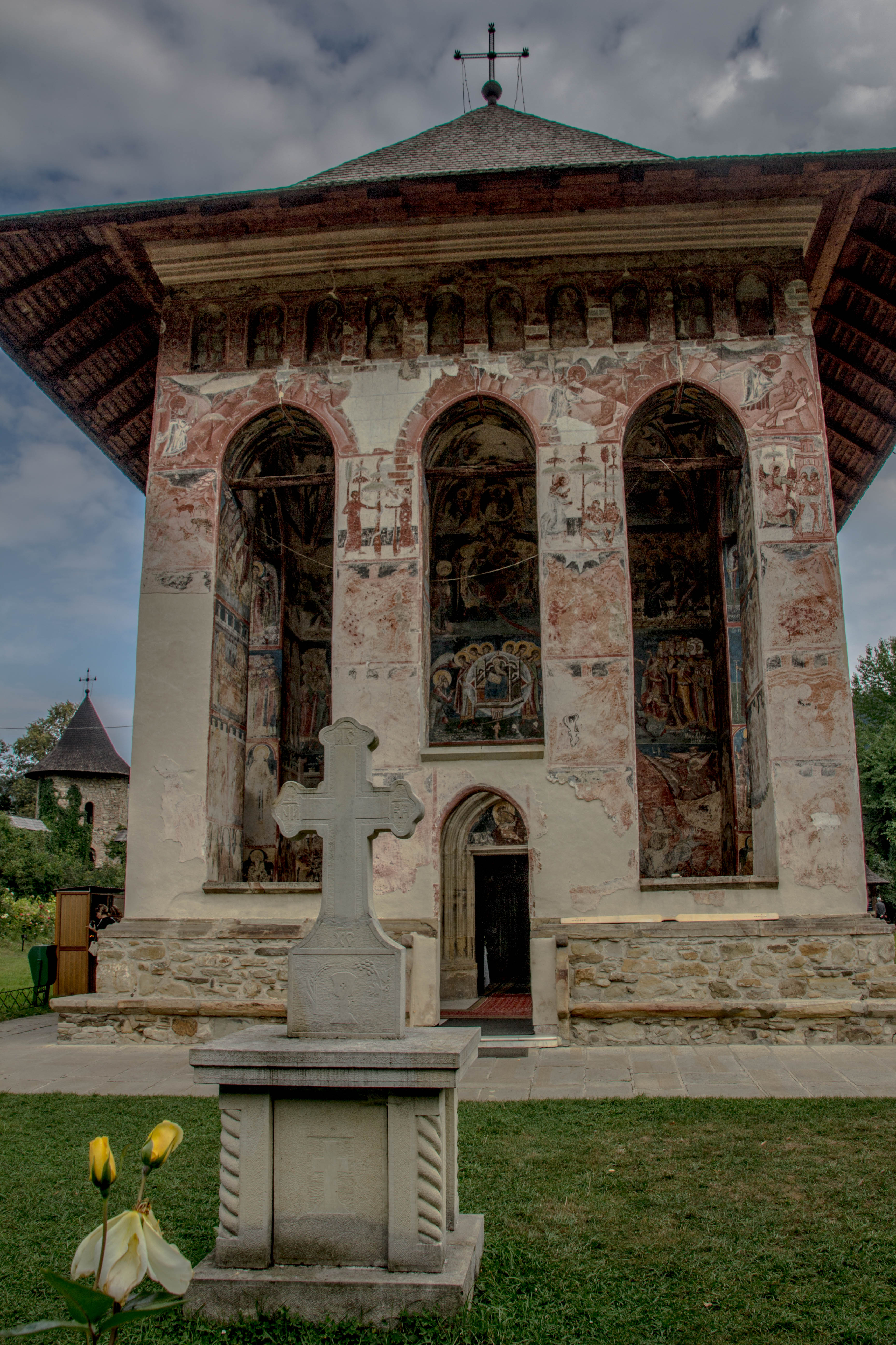 Mănăstirea Moldovița